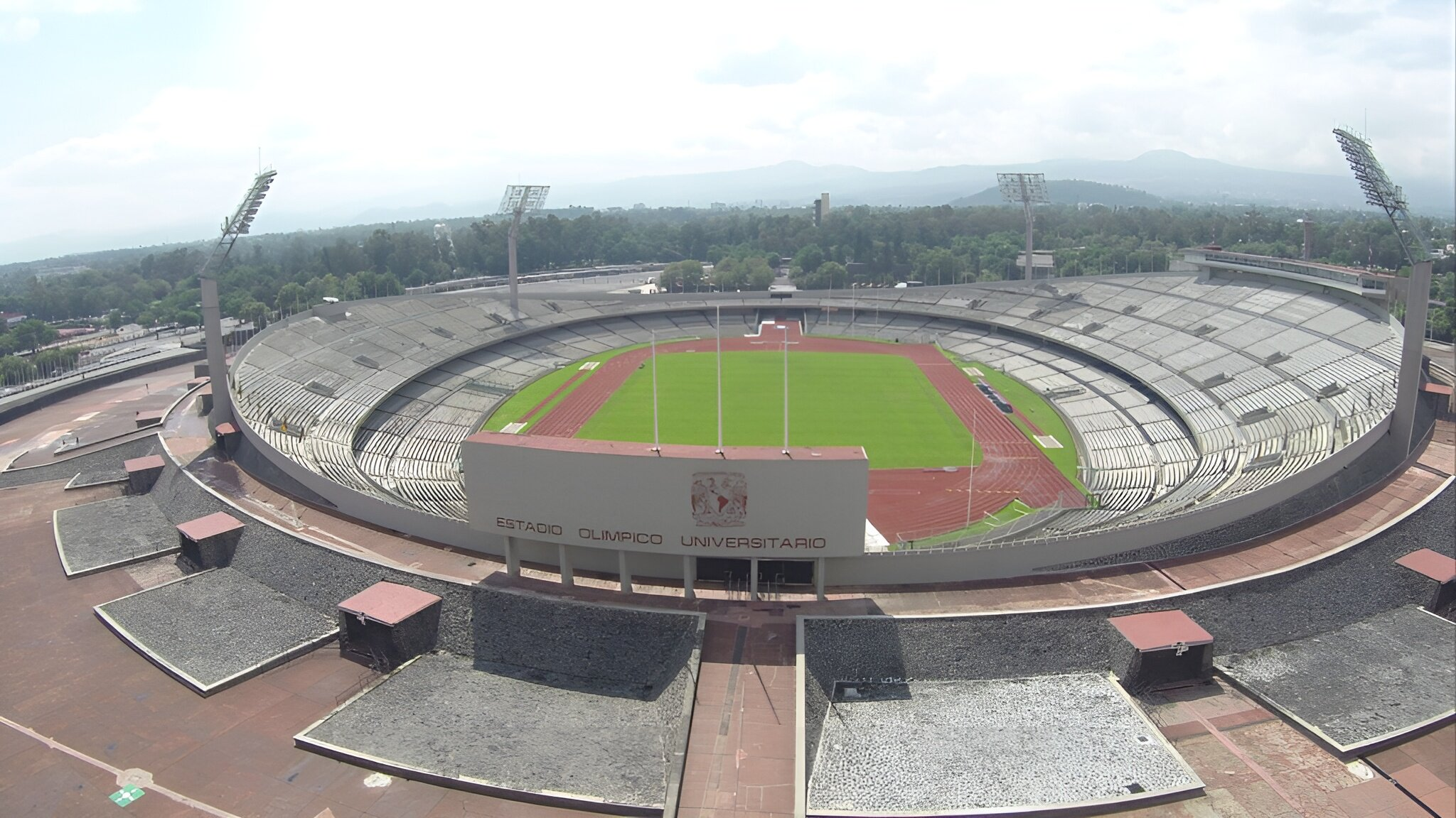 Estadio Olimpico Universitario